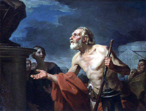 Diogenes Asking for Alms